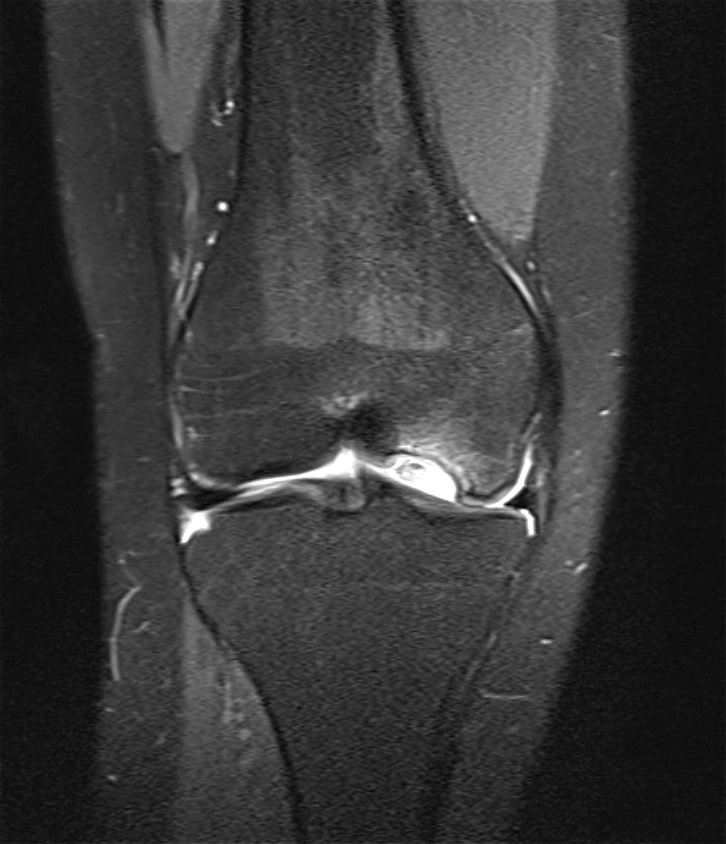 Kernspin OD Femurkondyle dissziert